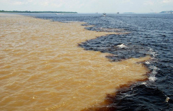 Rencontre des eaux du Rio Negro et du Rio Solimões devant Manaus